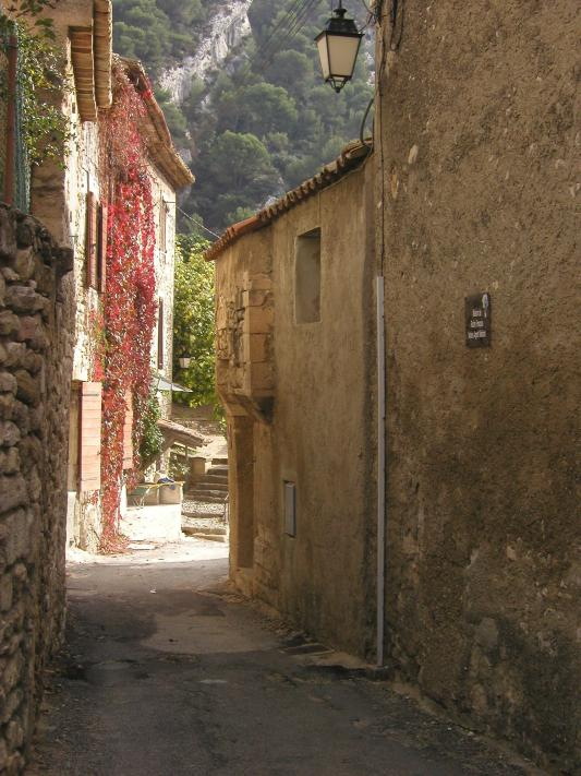 Commune de Robion, Vaucluse, Rue du vieux village